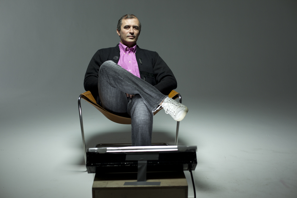 Foto tirada em 24/06/2010 pelo Garapa - Coletivo Multimídia ( Paulo Barros em entrevista ao projeto Produção Cultural no Brasil: Paulo Barros é carnavalesco.